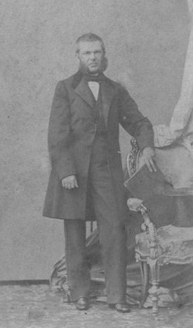 Князь Андрей Васильевич Оболенский (1824—1875)